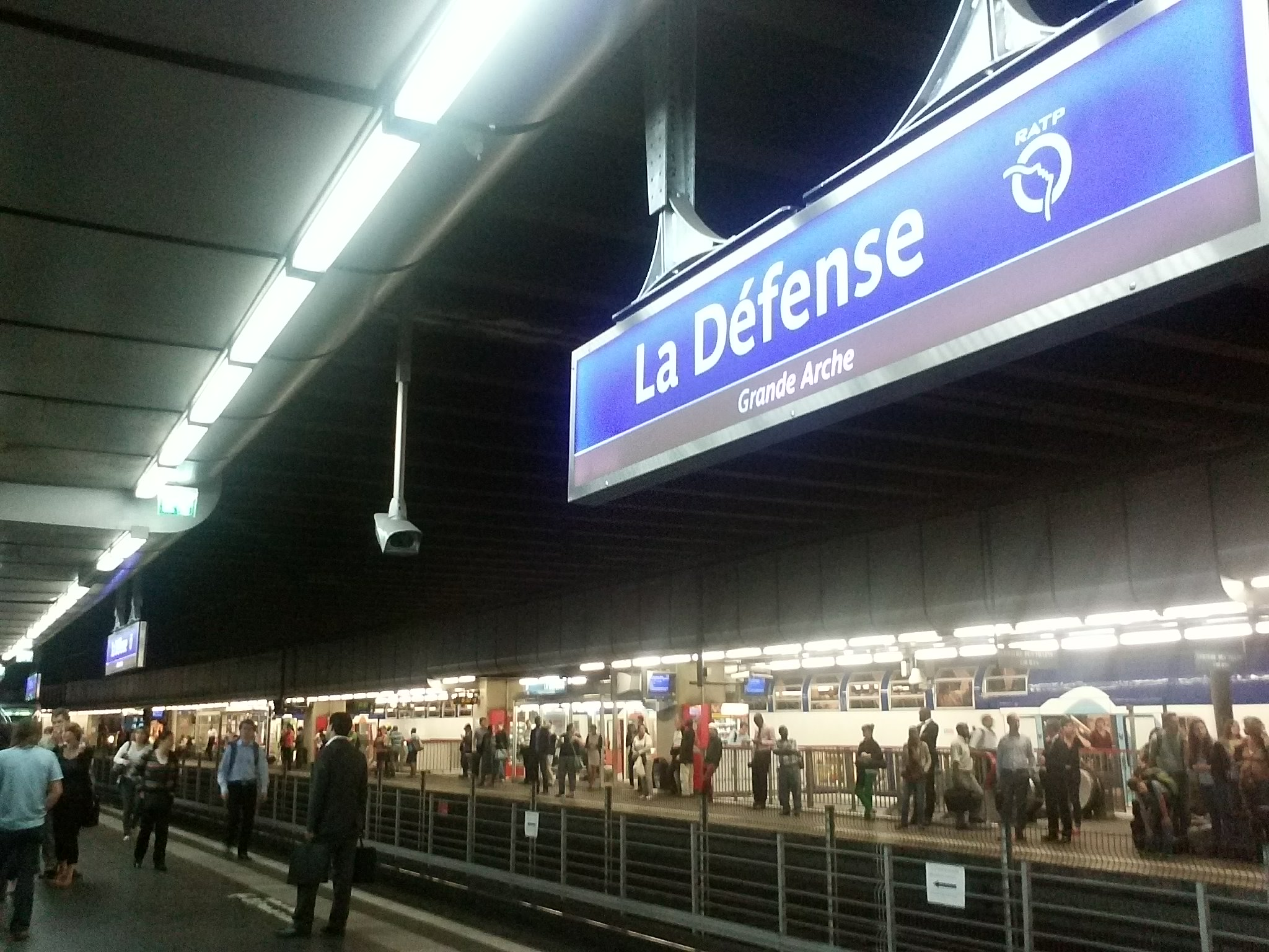 Gare de la Défense-2013